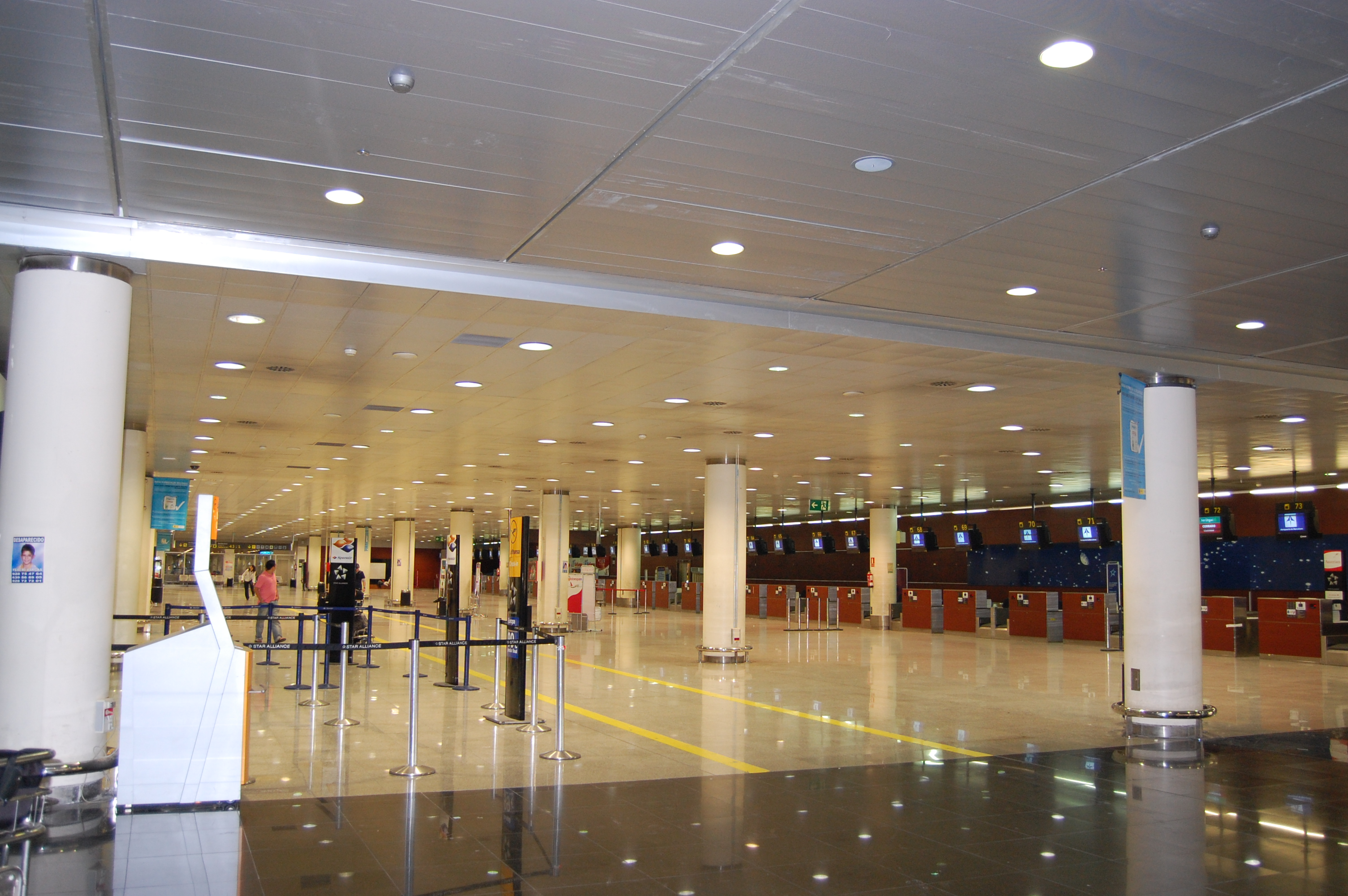 Interior do Aeroporto d'El Prat, Barcelona, Catalunha.